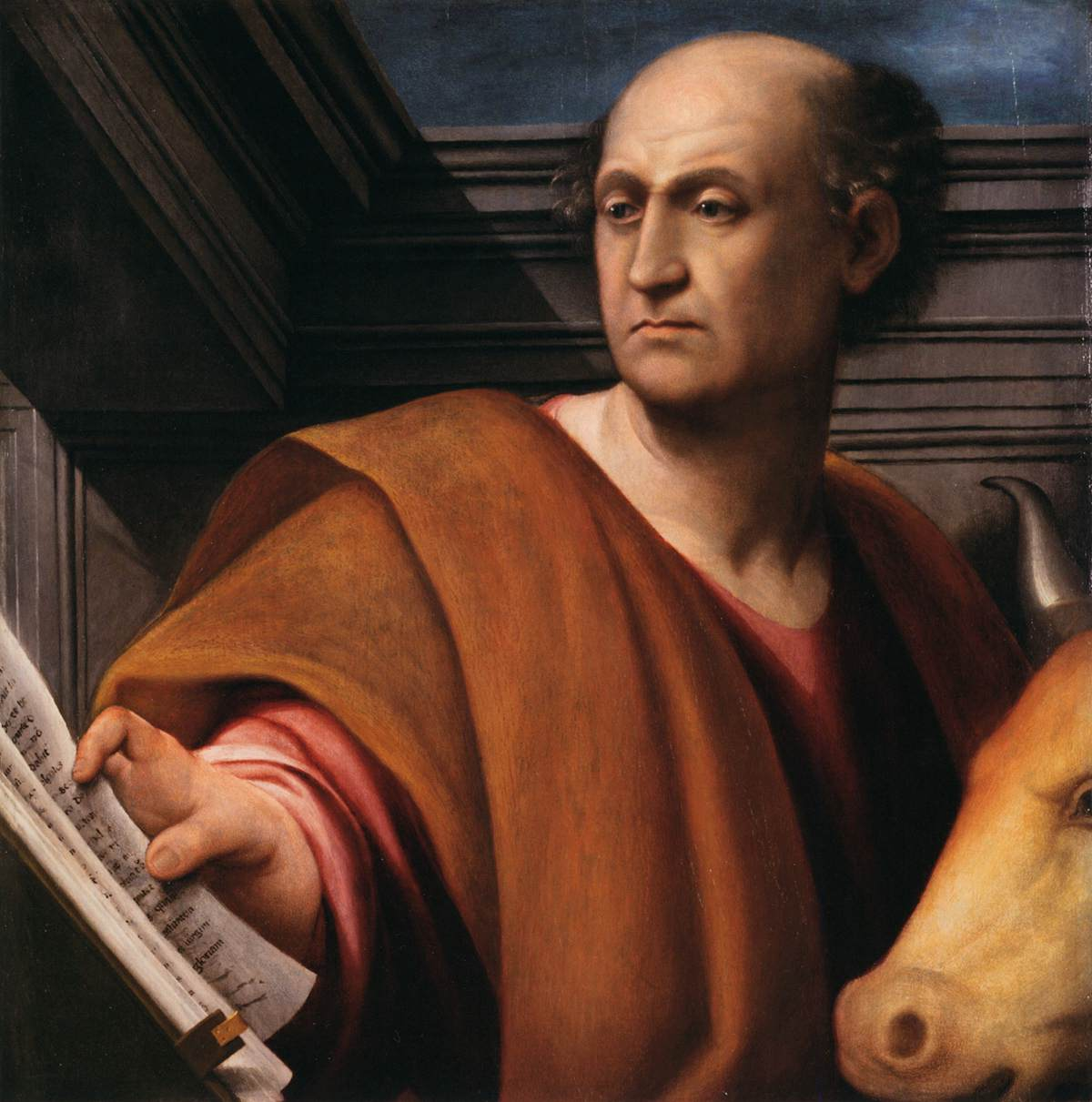 St Luke